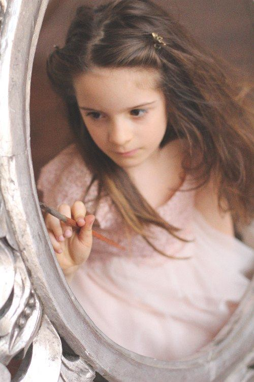 Barabás Lujza (művésznevén: Luisa Barabas) (2008. november 4.−) festő. A legfiatalabb magyar, akinek festményei a párizsi Louvre-ban is kiállításra kerültek.